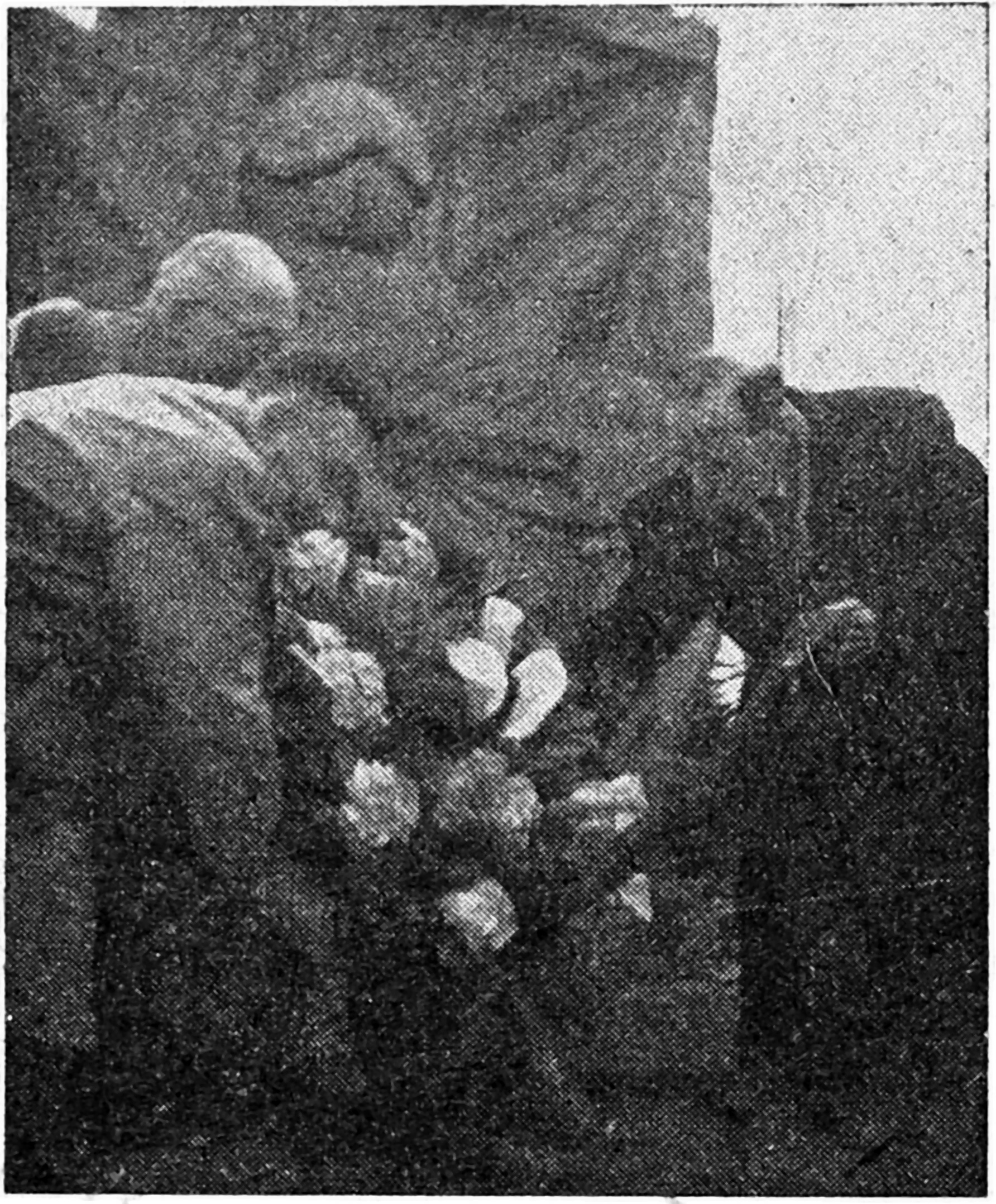 Estraranoj de Asocio de Esperantistoj en Pollando metas florkronon sur la tombon de nia Majstro. (S-anoj Dratwer kaj Johano Zawada, malantaŭe Tuszkiewicz).